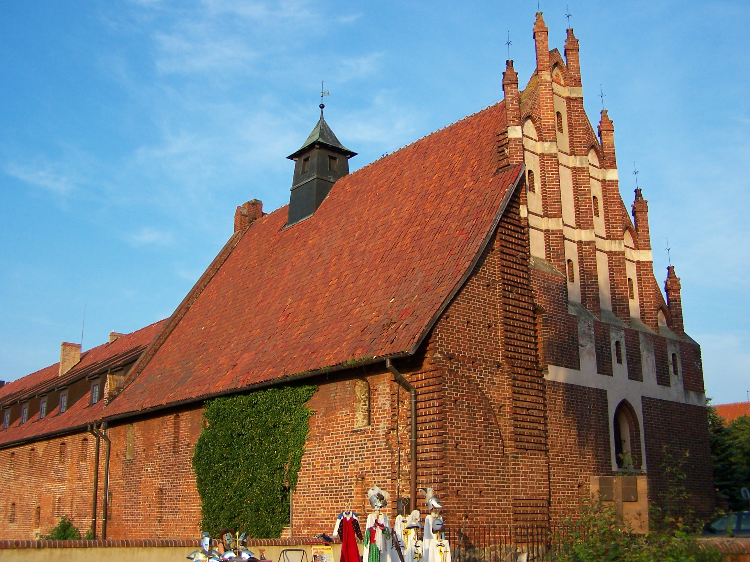 Kościół pw. św. Wawrzyńca w obrębie zamku niskiego w Malborku.